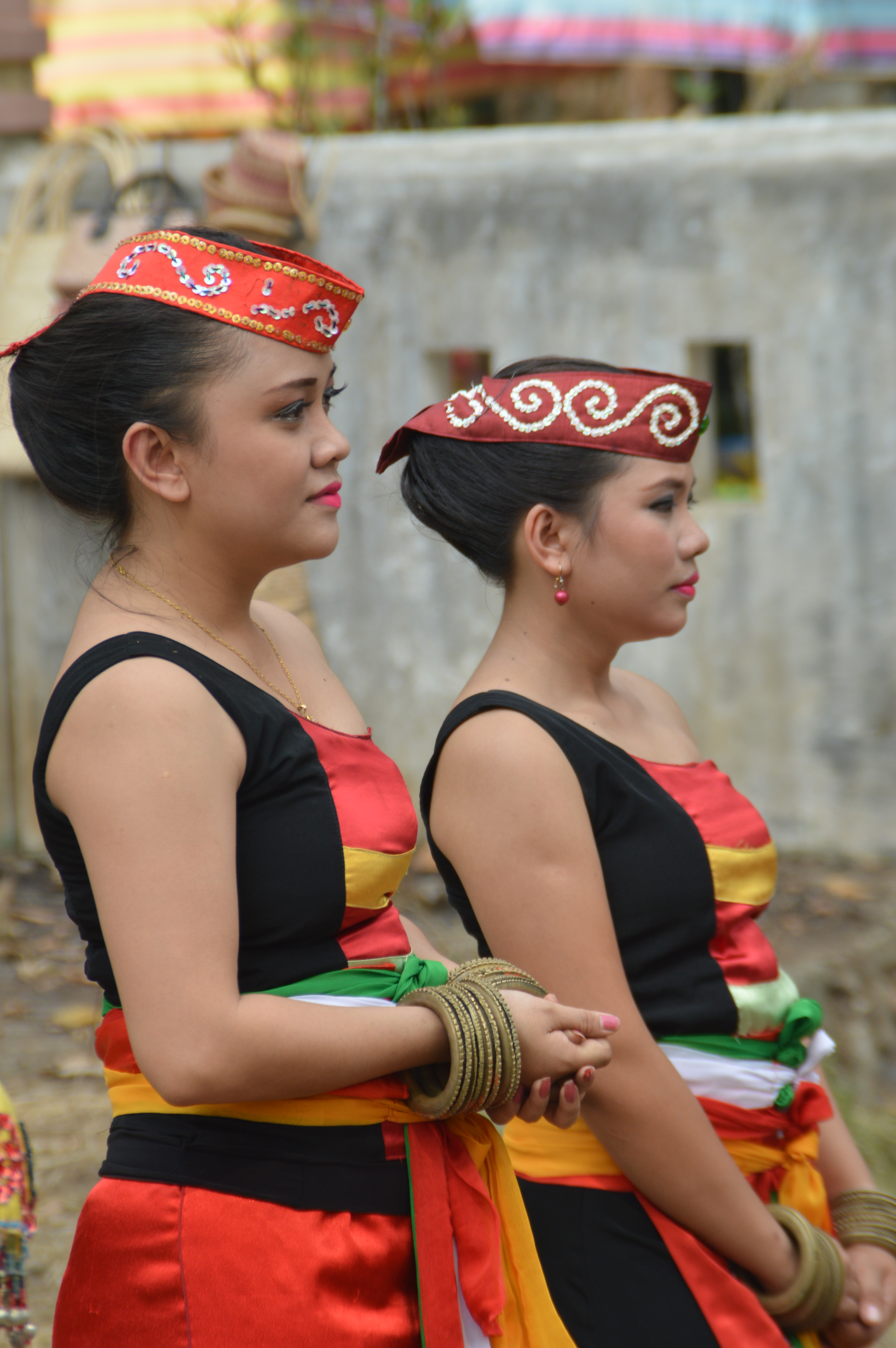 Remaja wanita Dayak Maanyan di Keang Ethnic Festival tahun 2015.